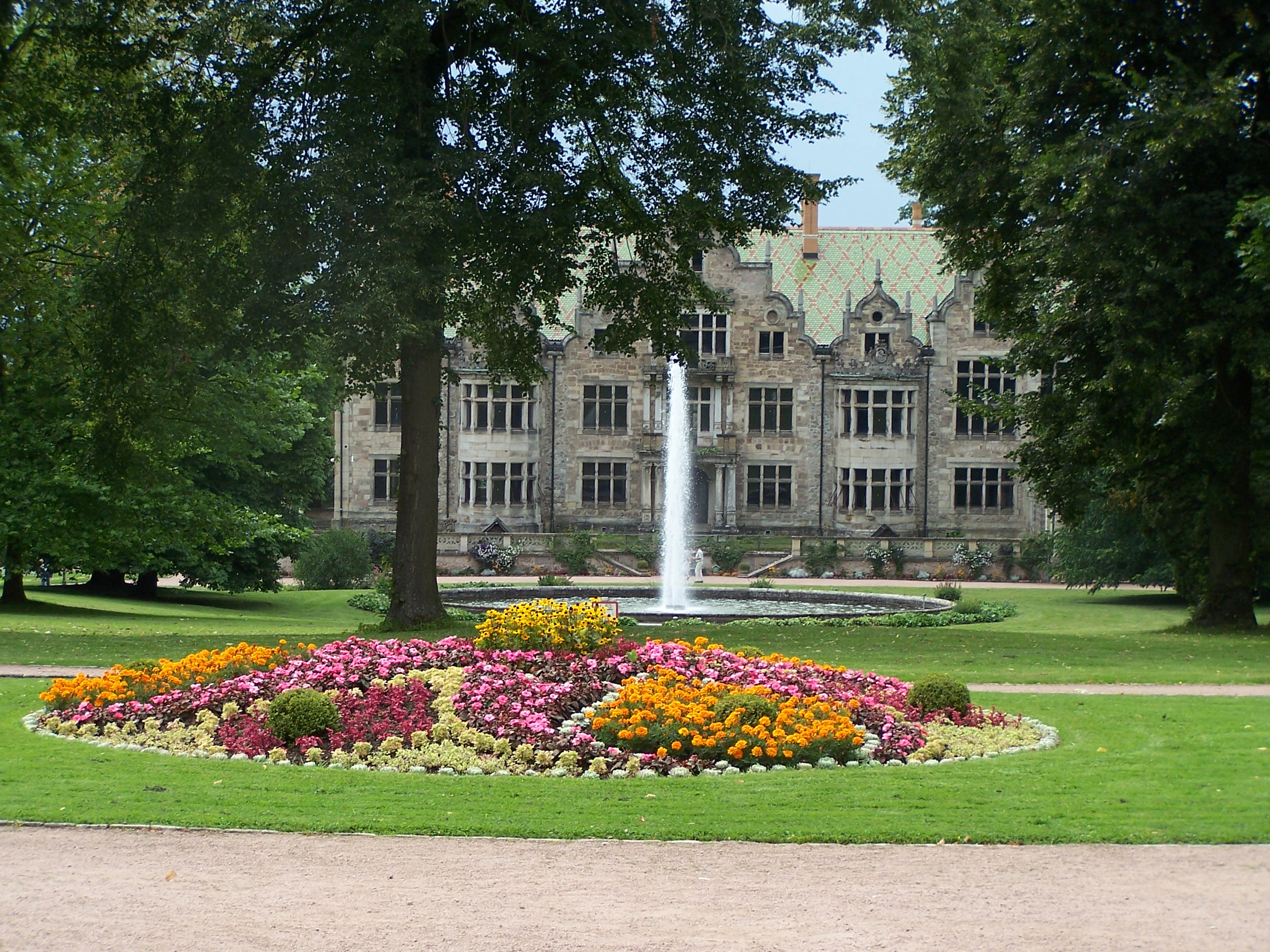 Großes Beet in der Sichtachse vom Hofmarschallamt zum Schloss und Springbrunnen.